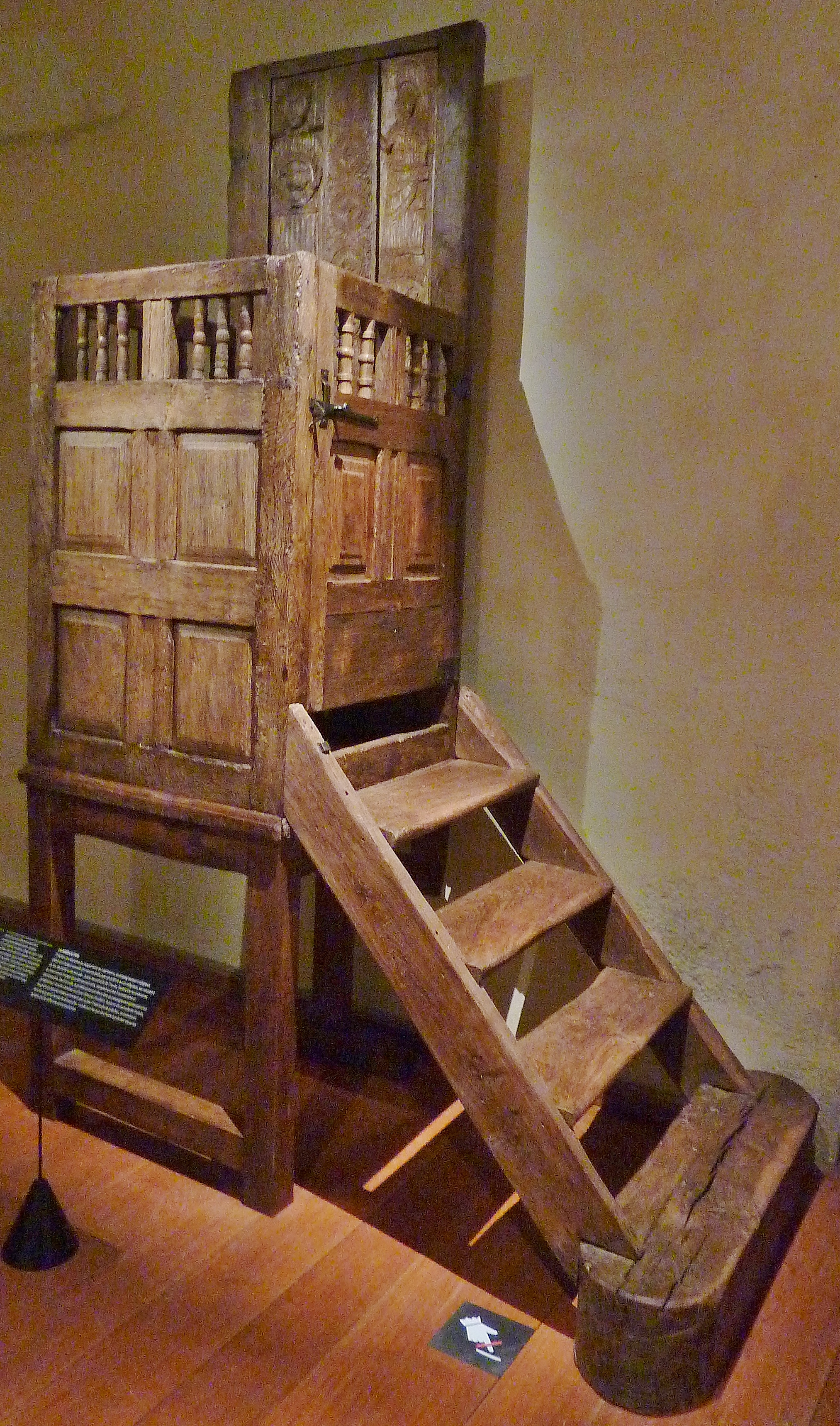 Merléac : chaire à prêcher qui était située dans la chapelle Saint-Jacques, située dans le village de Saint-Léon. Datant de la première moitié du XVIe siècle, elle est constituée d'un dossier et d'une cuve et semble être encore proche des chaires "mobiles" de la fin du Moyen-Âge. Les chaires fixes, généralement adossées à un pilier, ne se sont généralisées qu'au XIXe siècle. Ici, l'escalier est un rajout datant de l'époque moderne. This object is classé Monument Historique in the base Palissy, database of the French furniture patrimony of the French ministry of culture, under the references IM22002791 and PM22001491.